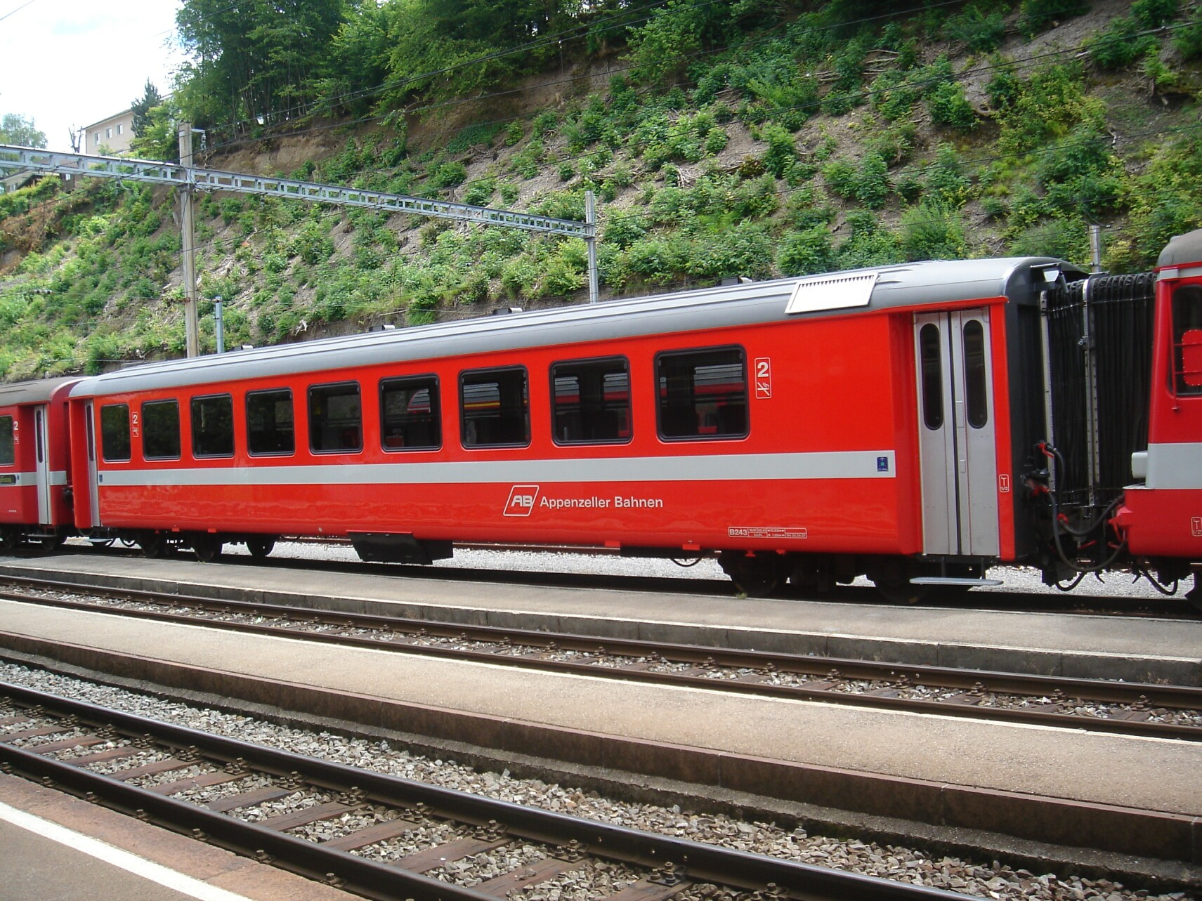 Modernisierter B 243 (FFA Typ I, ex 247 ex 27, 1973) der Appenenzeller Bahnen in Herisau